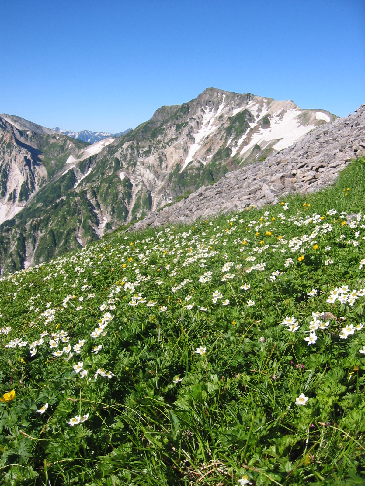 北アルプスの小蓮華山に群生するハクサンイチゲ。後方の山は白馬岳。